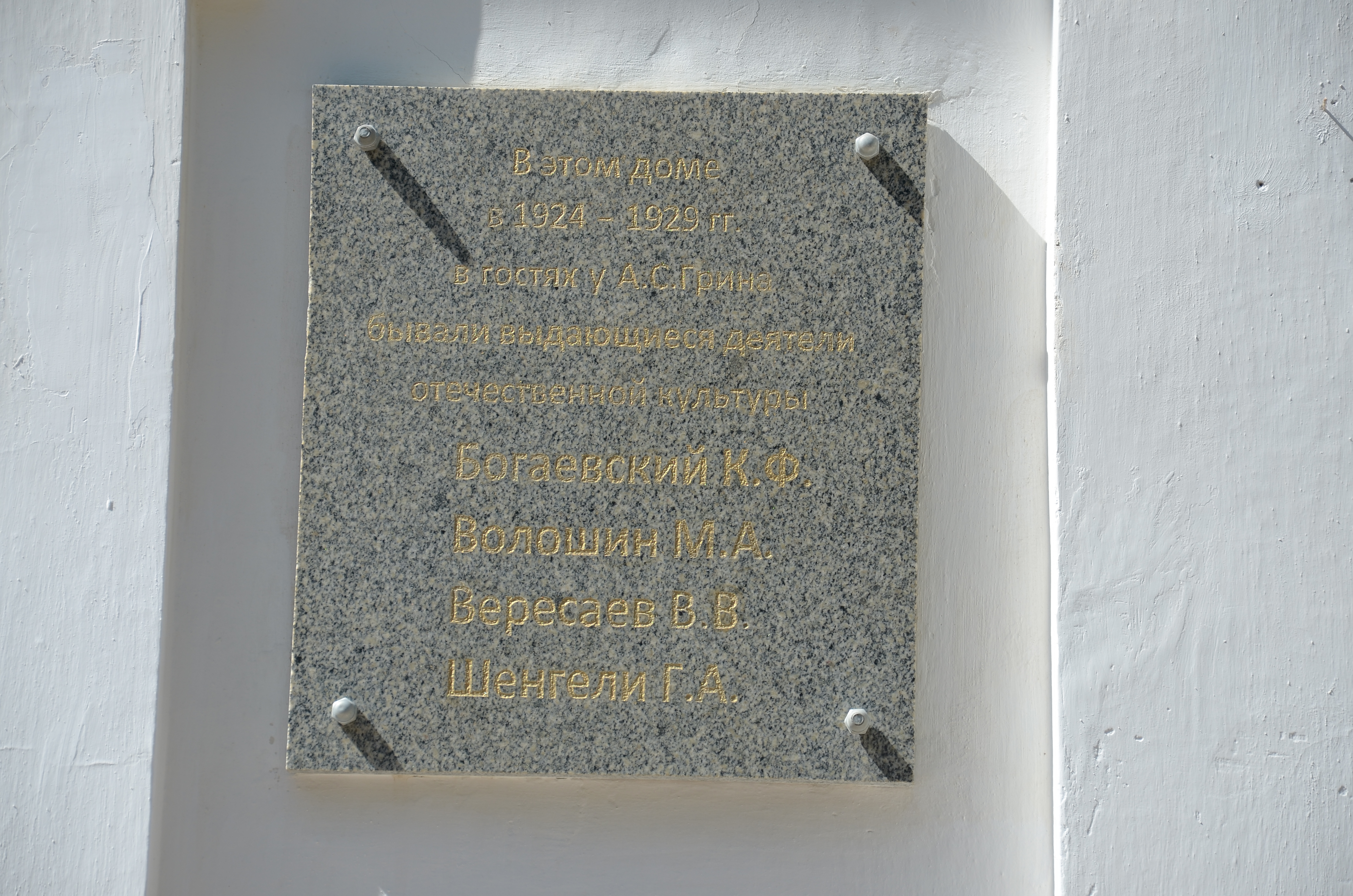 Феодосия